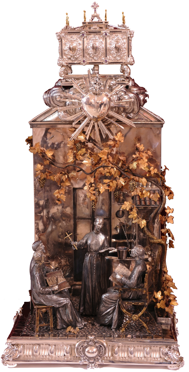 Relicario Itinerante que contiene el corazón de San Juan de Ávila, que viaja por las Diócesis españolas.